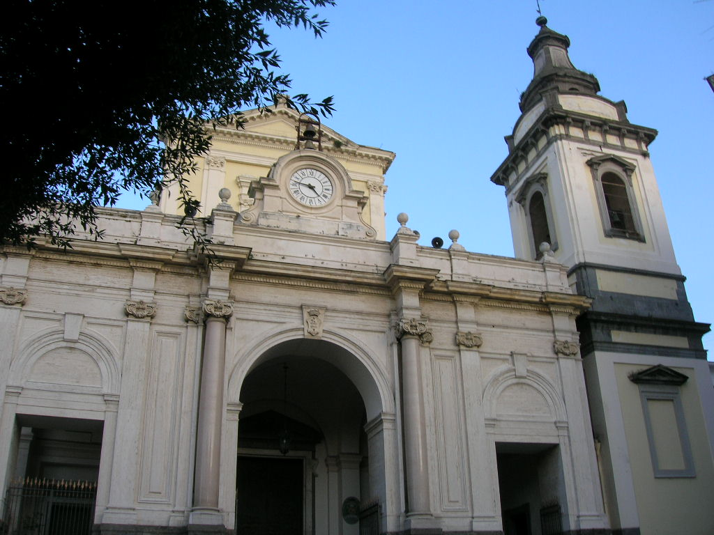 La cattedrale di Castellammare di Stabia